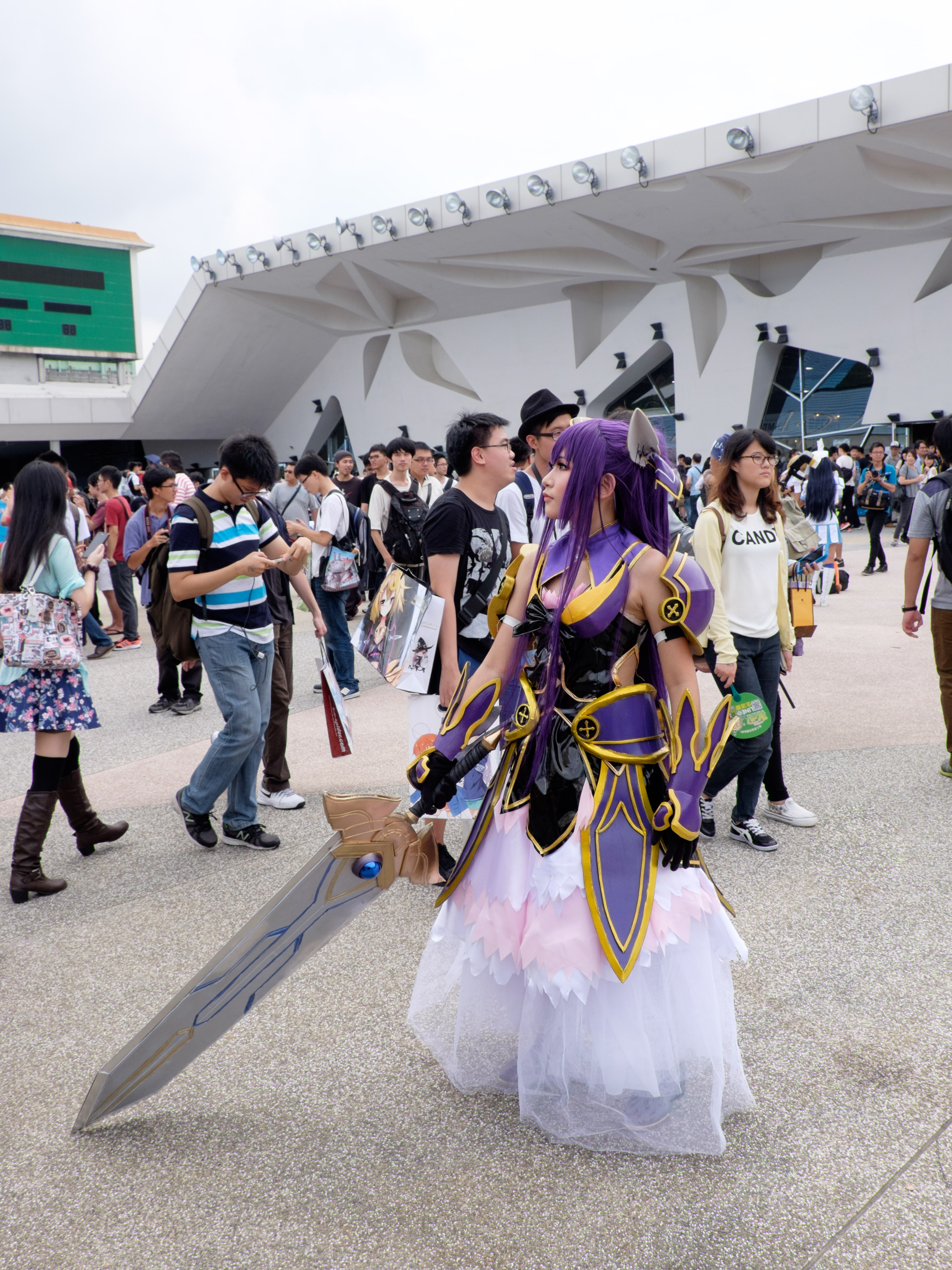 Fancy Frontier 26第一日中午，＜デート・ア・ライブ＞持鏖殺公的夜刀神十香Cosplayer。